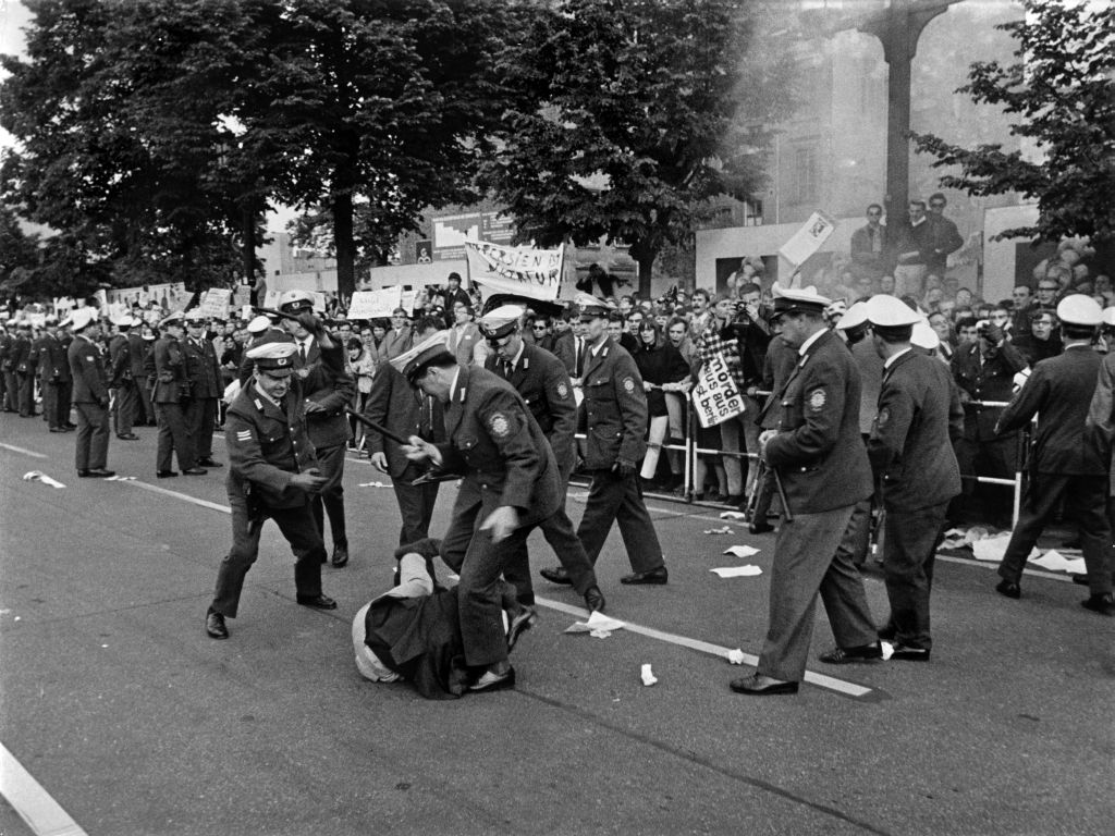 Ludwig Binder: Studentenrevolte 1967/68, West-Berlin; veröffentlicht vom Haus der Geschichte der Bundesrepublik Deutschland